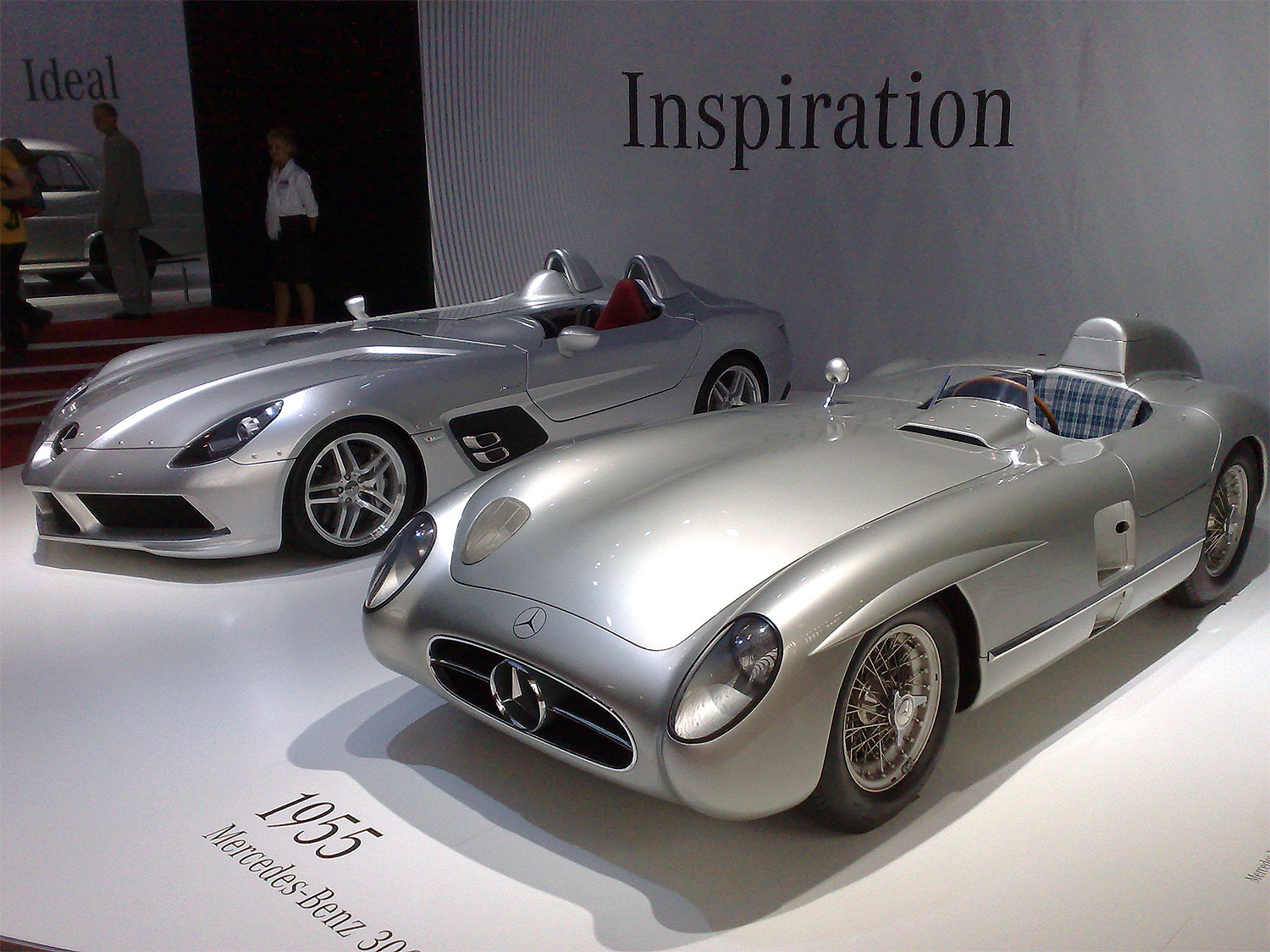 Mercedes-Benz 300 SLR neben Mercedes-Benz SLR Stirling Moss auf der IAA 2009